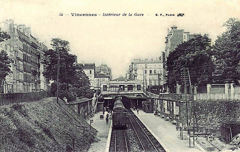 La gare de Vincennes, Val-de-Marne, France.